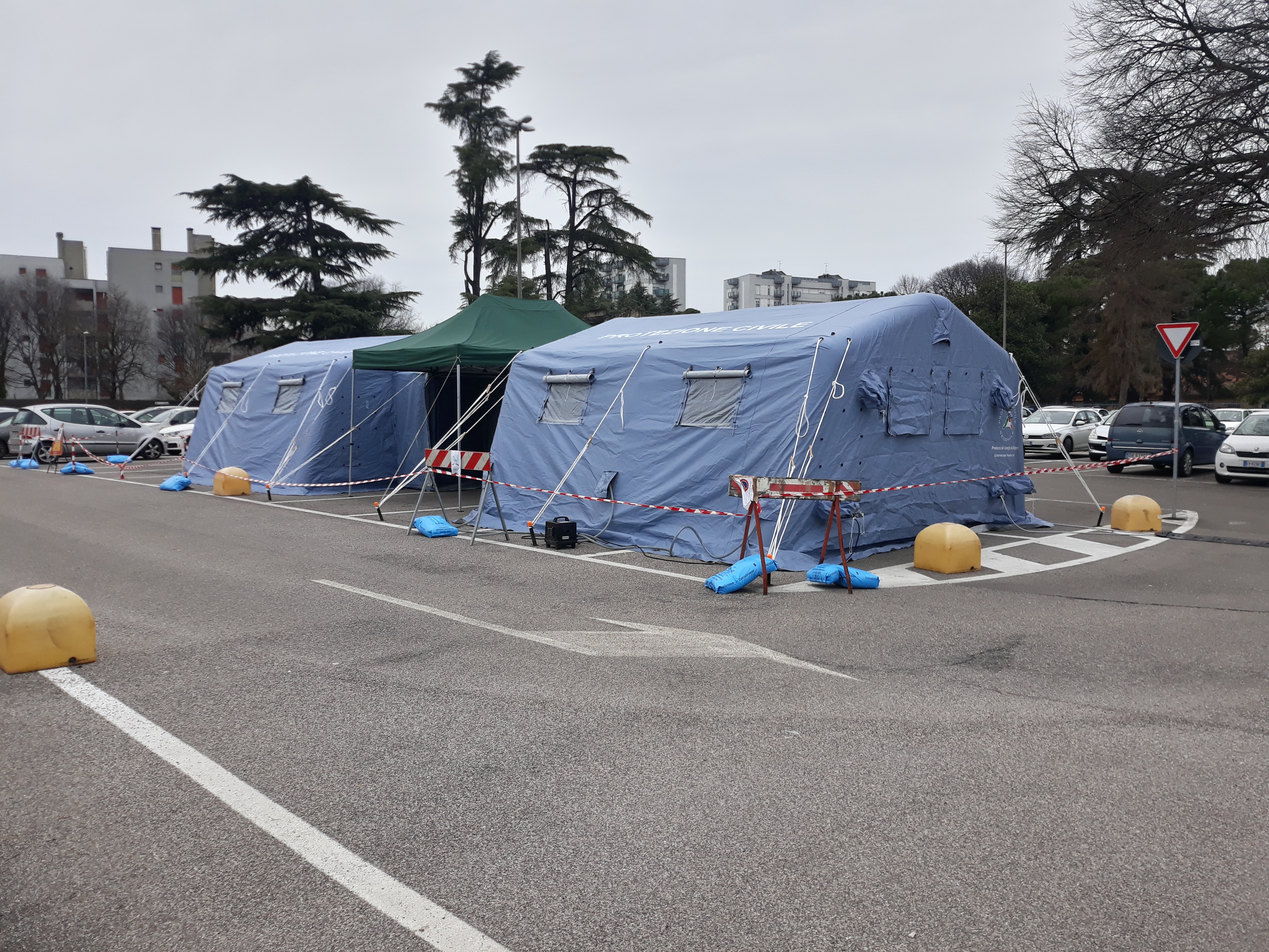 Tenda della protezione civile installata davanti al policlinico di Verona in occasione dell'epidemia di COVID-19.